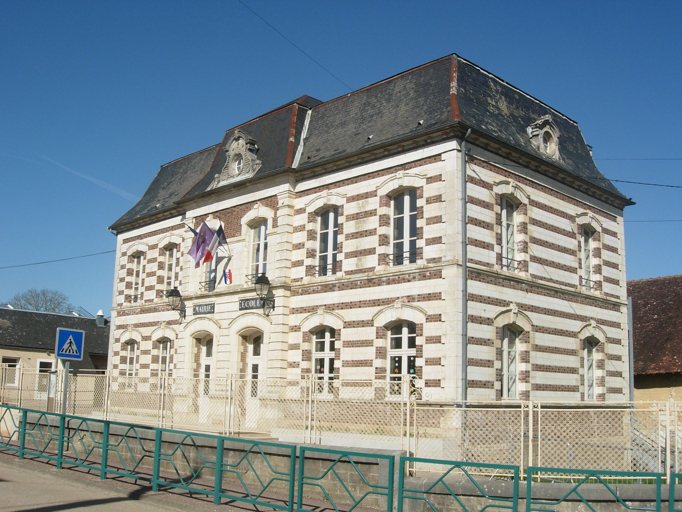 Mairie de Bercenay-en-Othe